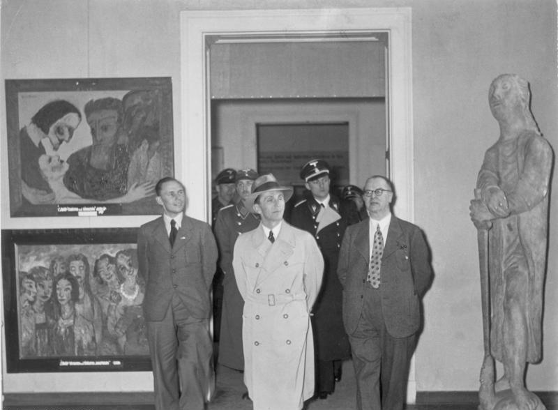 Reichsminister Dr. Goebbels auf der Ausstellung "Entartete Kunst" Am Sonntag mittag besuchte der Reichsminister die Ausstellung im "Haus der Kunst". Rechts vom Reichsminister (mit Brille) der Ausstellungsleiter Pistauer. Fot.: Ste. 27.2.38